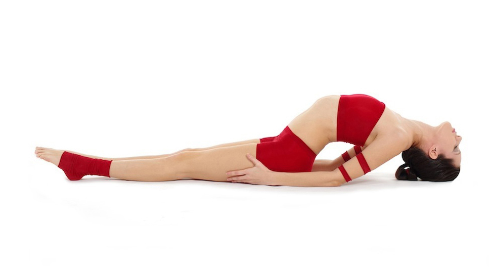 Matsyasana by Nina Mel, Yoga Teacher